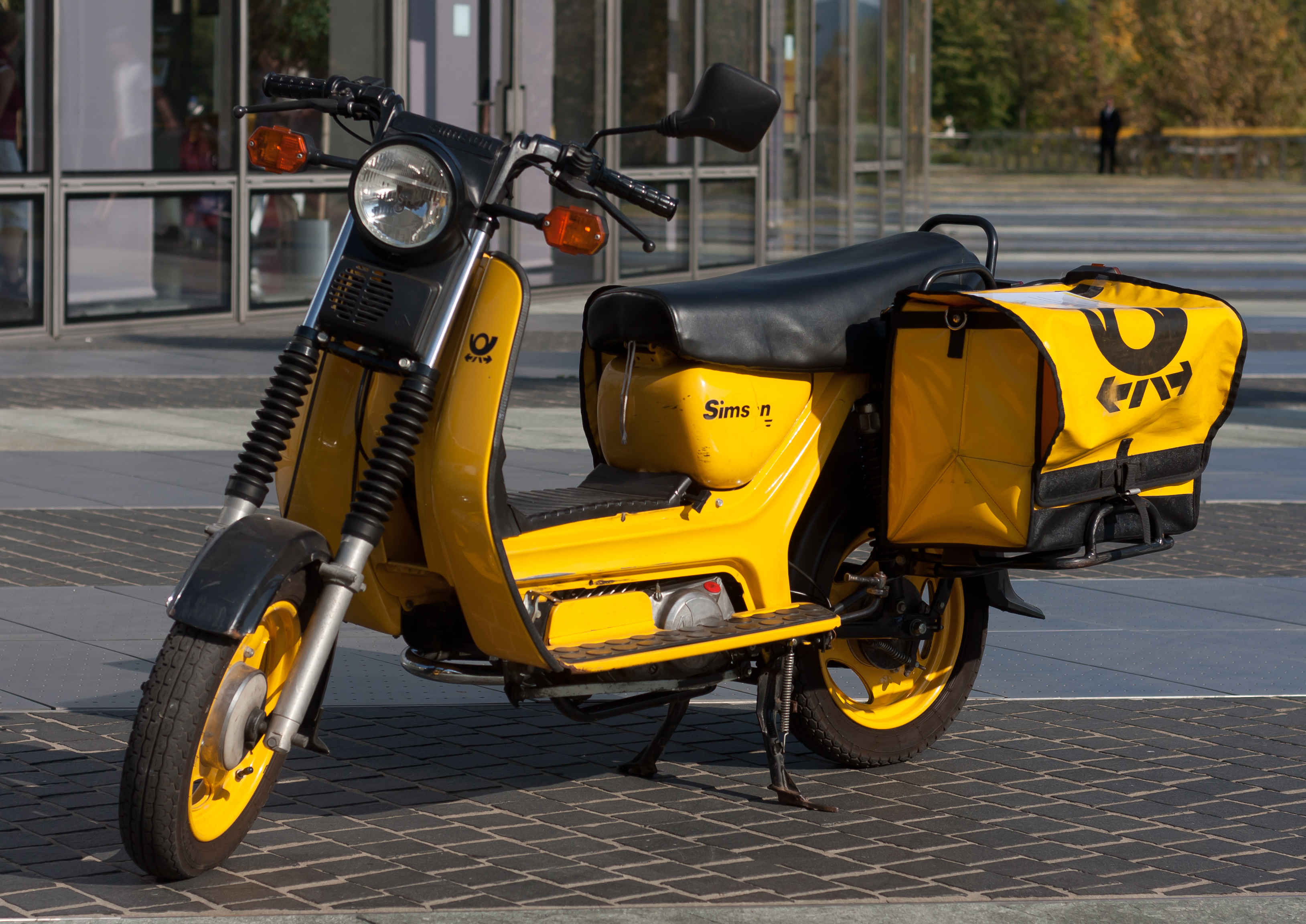 Simson SR 50/1 Suhler Fahrzeugwerk GmbH, Baujahr 1995, Motorleistung 2,4kW/3PS/5500 U/min., Hubraum 49 cm3, Standort Köln. Erweiterte Ausführung mit Elektrostarter, seitlich angebrachte Taschenhalter für den Postdienst.